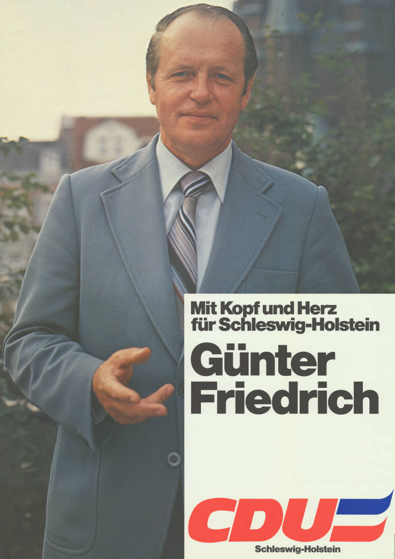 Mit Kopf und Herz für Schleswig-Holstein Günter Friedrich CDU Schleswig-Holstein Abbildung: Foto Plakatart: Kandidaten-/Personenplakat mit Porträt Auftraggeber: Verantw.: CDU Schleswig-Holstein Objekt-Signatur: 10-012 : 423 Bestand: Landtagswahlplakate Schleswig-Holstein (10-012) GliederungBestand10-18: Landtagswahlplakate Schleswig-Holstein (10-012) » Landtagswahl am 29.4.1979 » Kandidatenplakate Lizenz: KAS/ACDP 10-012 : 423 CC-BY-SA 3.0 DE